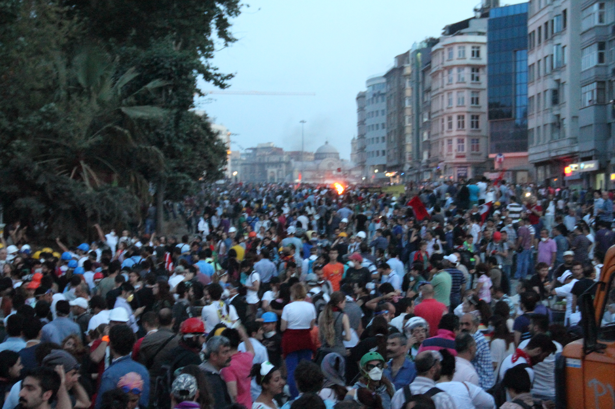 Gezi Parkı Müdahale